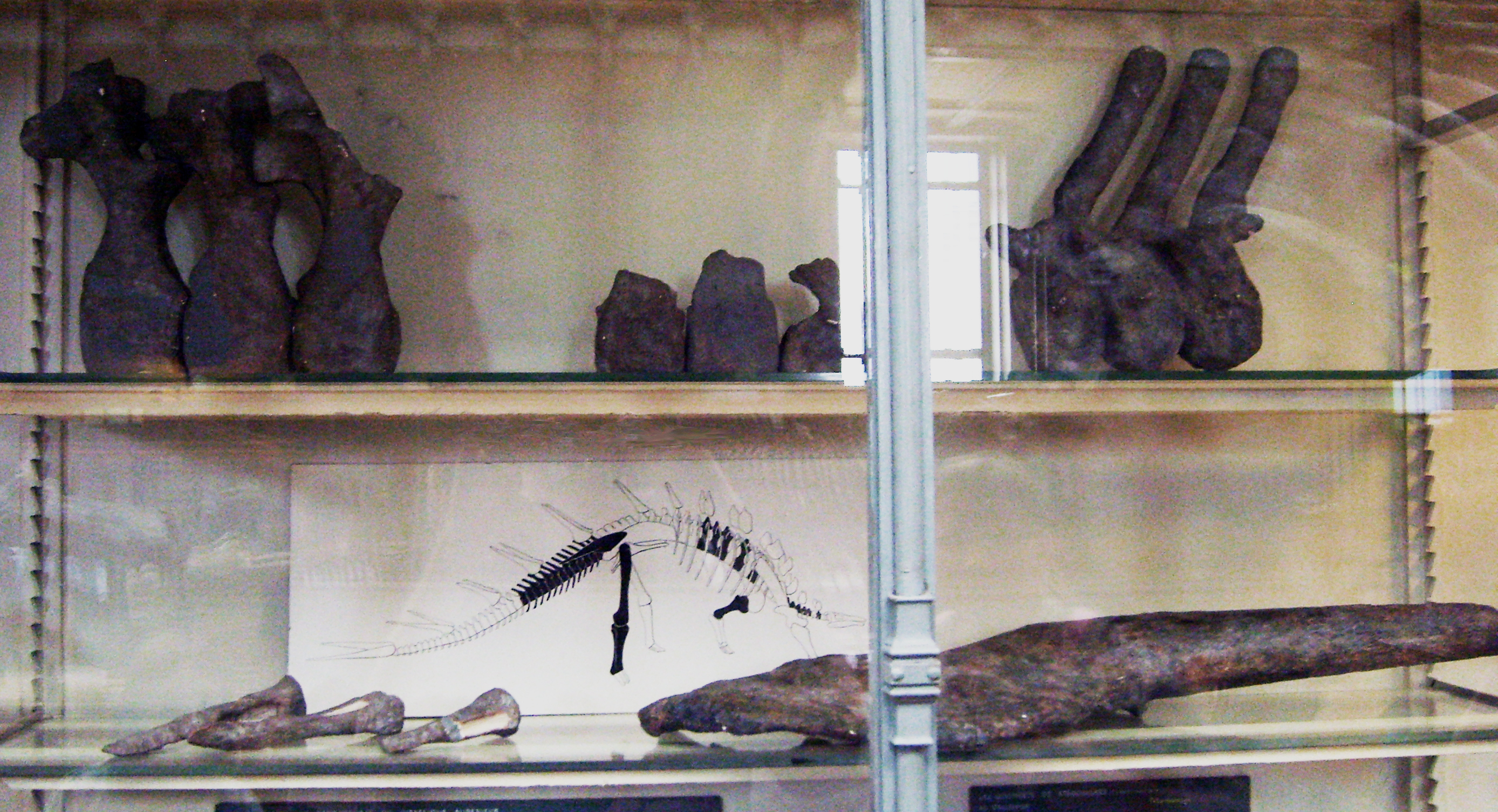 Vertebrae and spike of Lexovisaurus, Muséum national d'histoire naturelle, Paris.